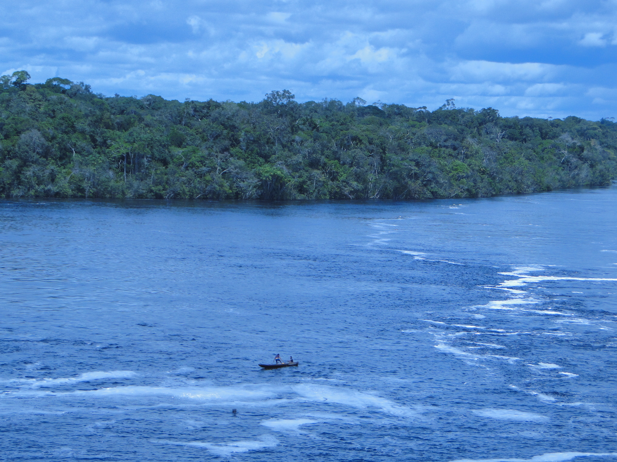 Vista da comunidade indígena Tunuí do alto rio Içana, povo Baniwa, Terra Indígena Alto Rio Negro.